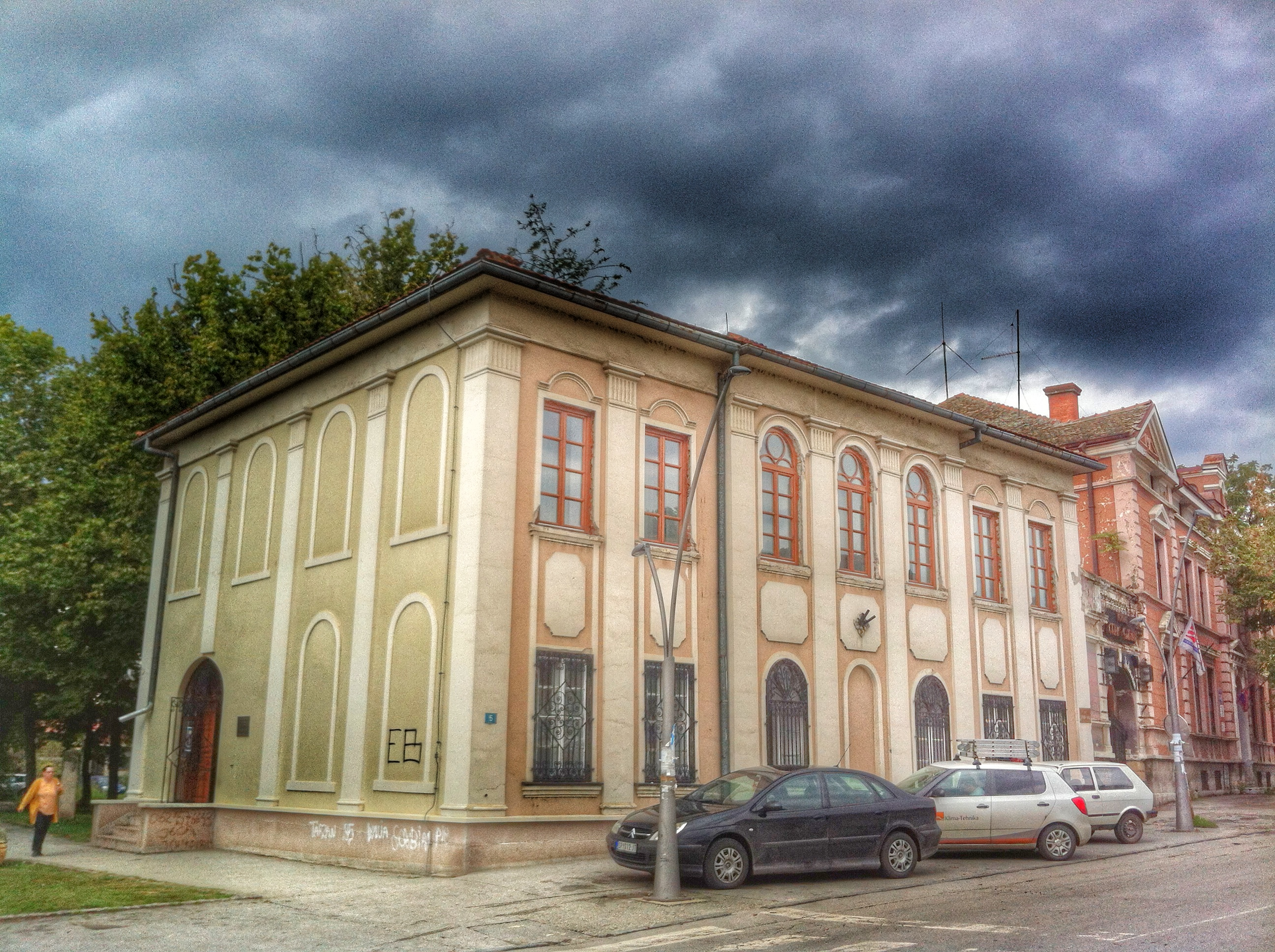 Српски (ћирилица): Народни Музеј је основан 1966.године.